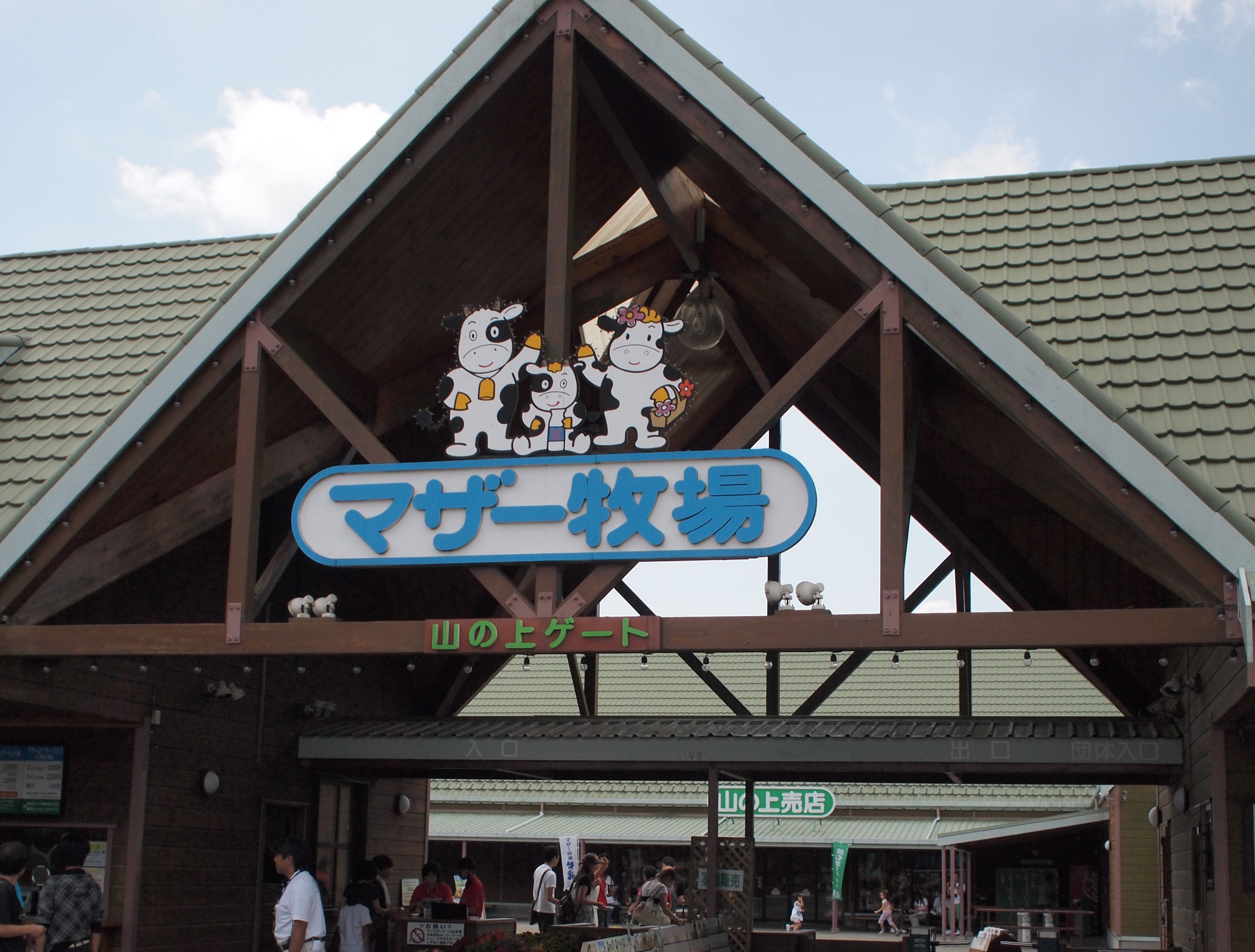 山の上ゲート